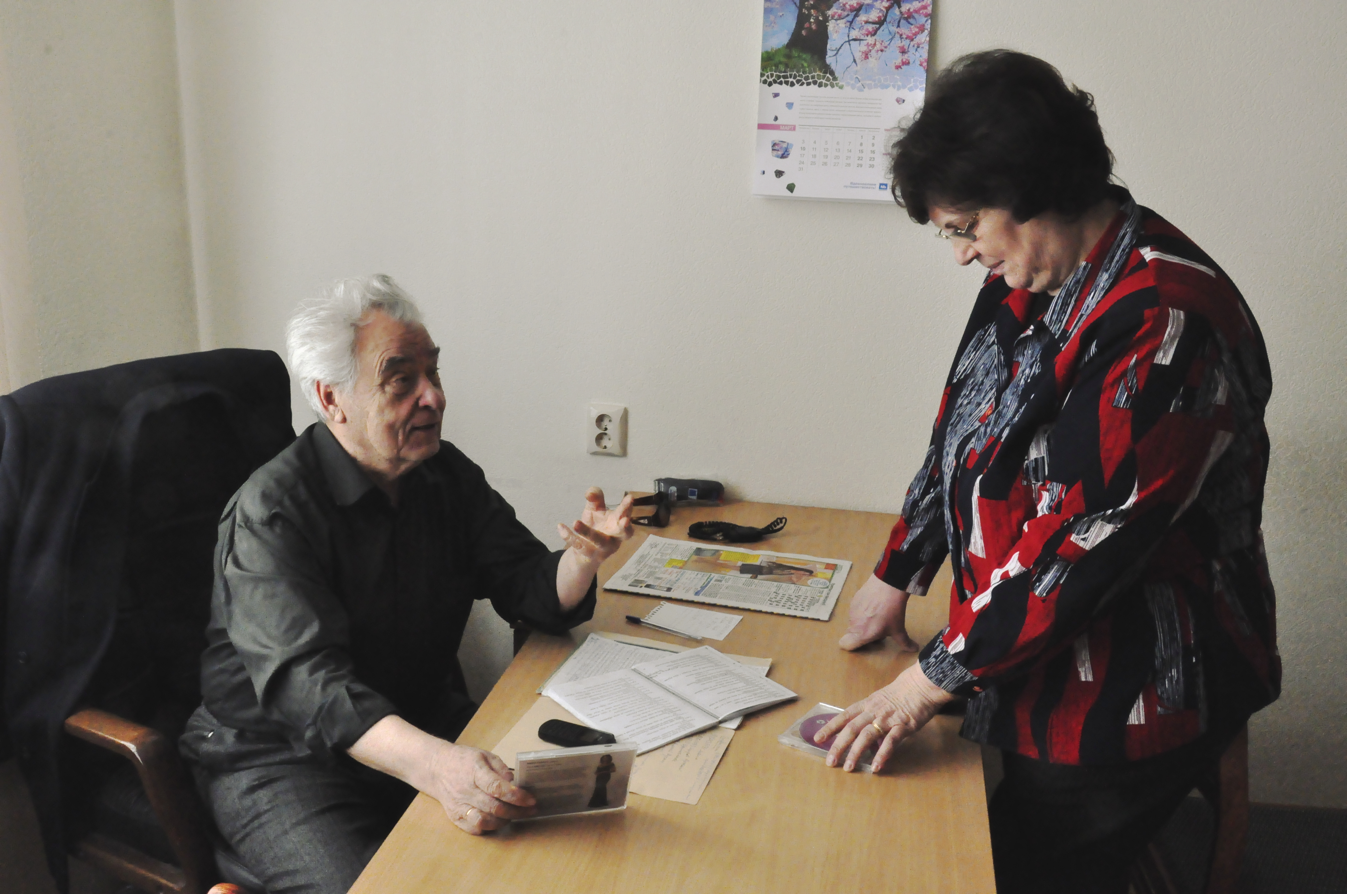 Николай Голышев и Тамила Шайкевич в Уральской государственной консерватории, март 2014